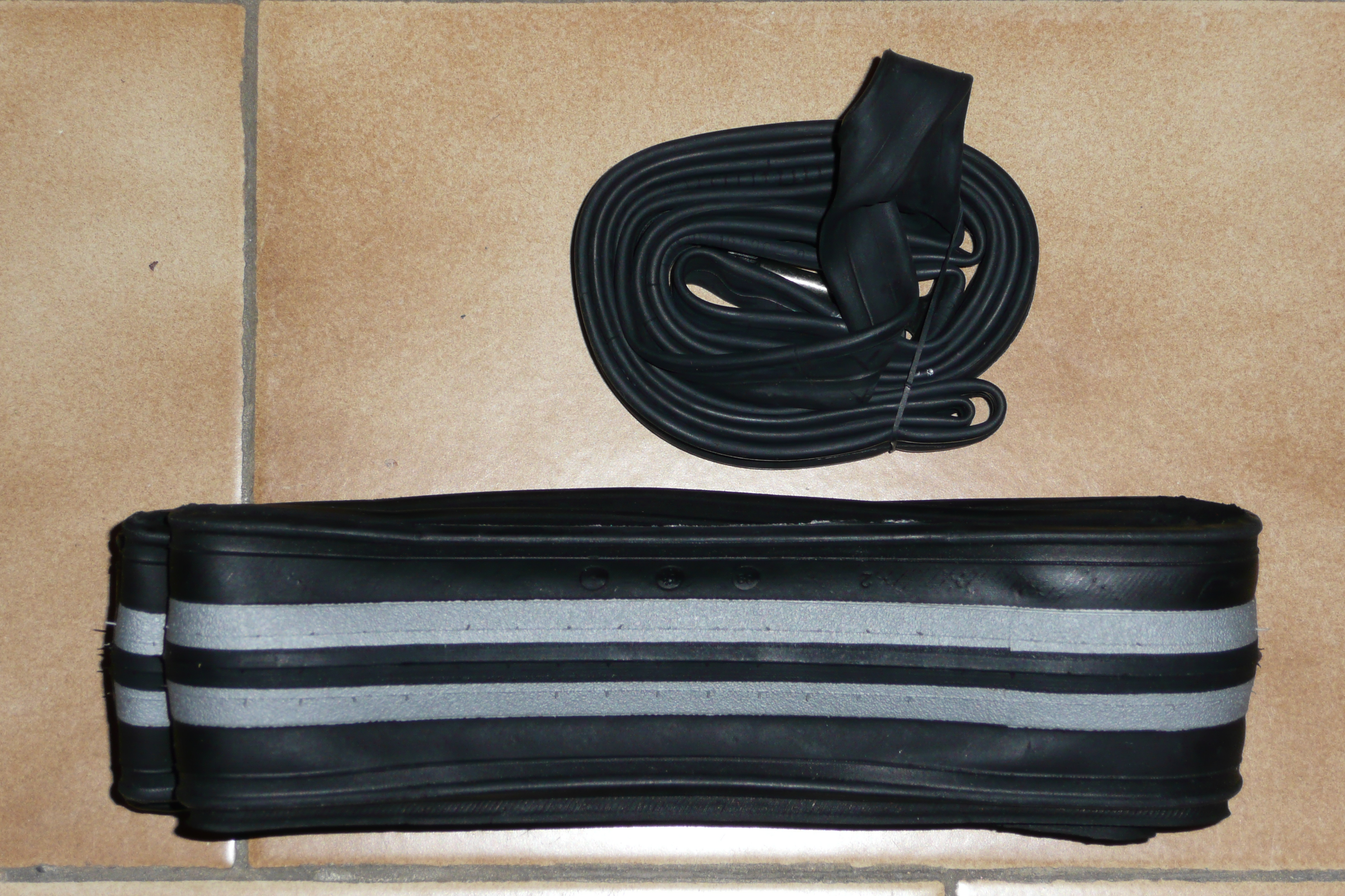 Chambre à air 700x18 à 25C et pneu plié 700x23C juqu'à 7,7 bars.